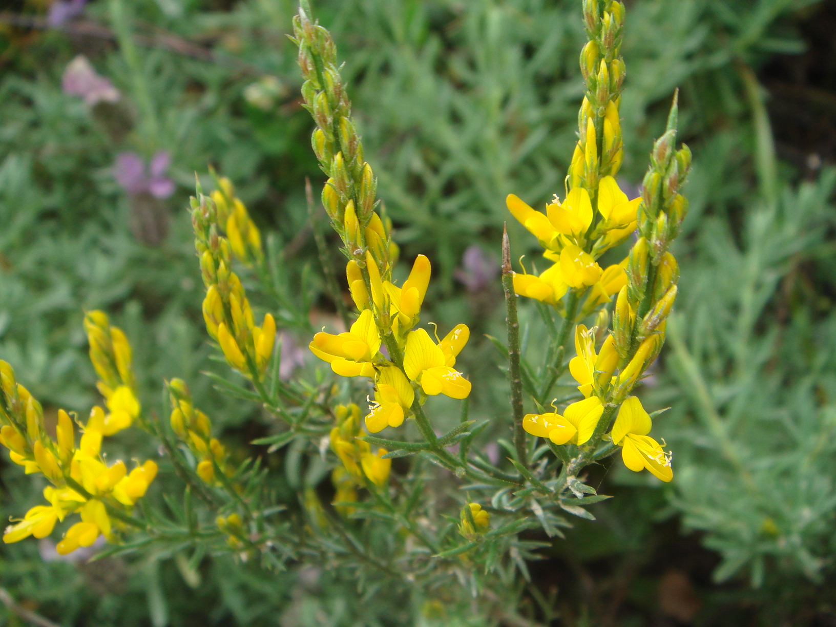 Aulaga (Genista tridens), Ceuta, España.